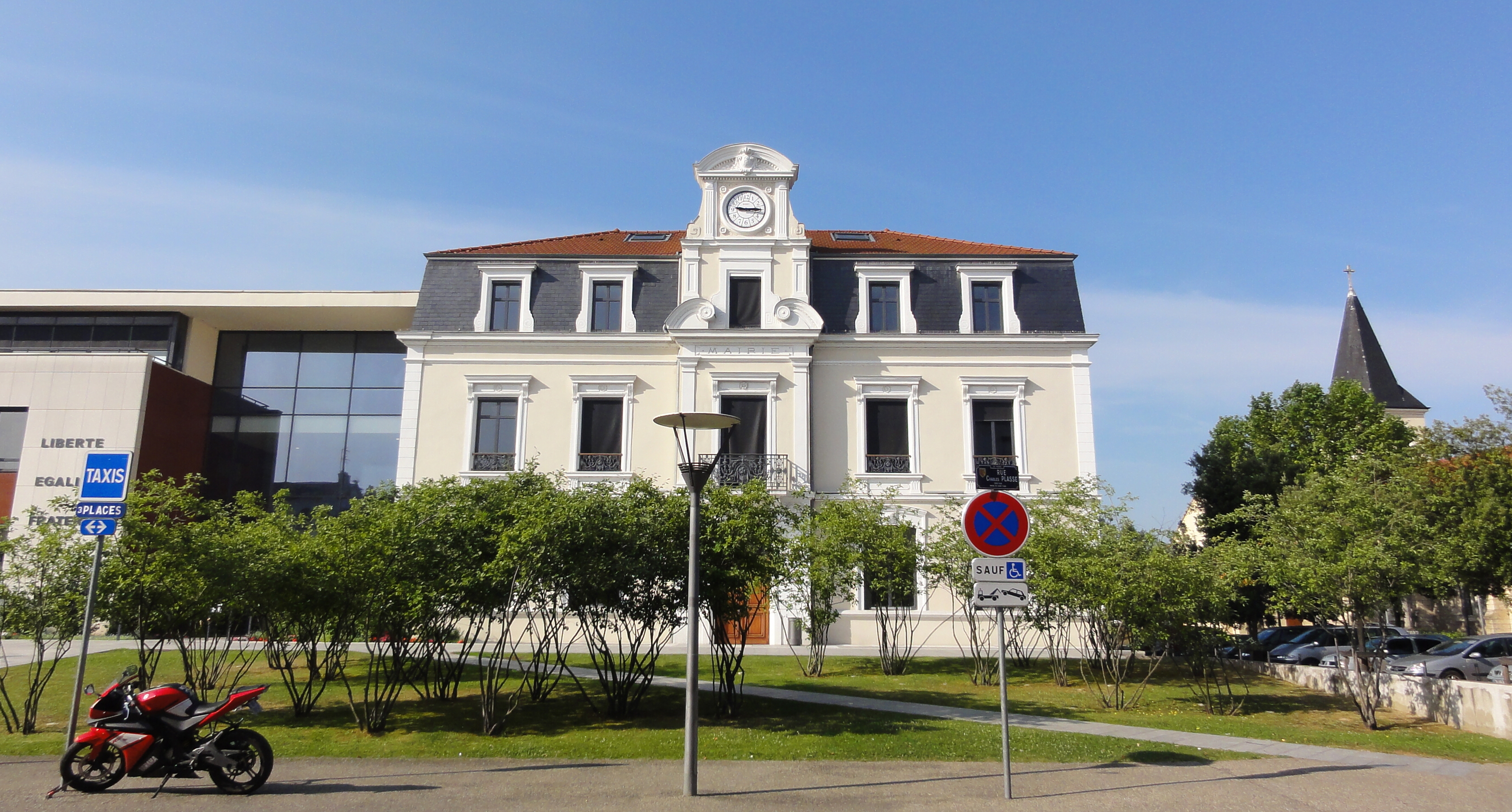 L'hôtel de ville de Saint-Fons